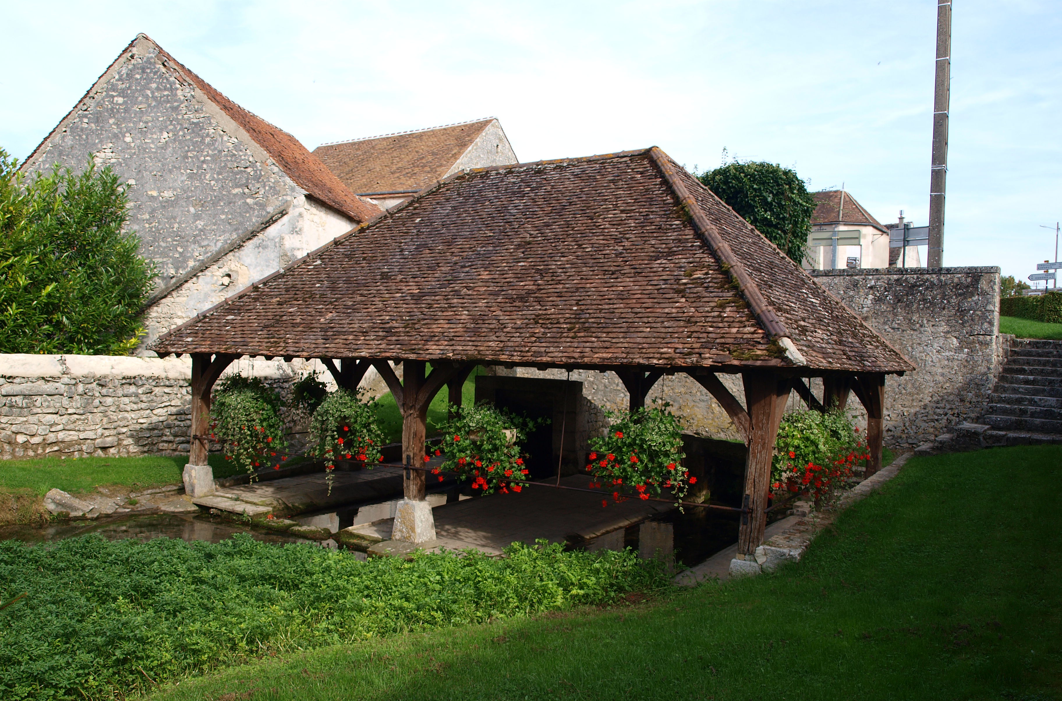 Préfontaines (Loiret, France) ; lavoir